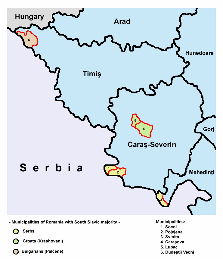 Map